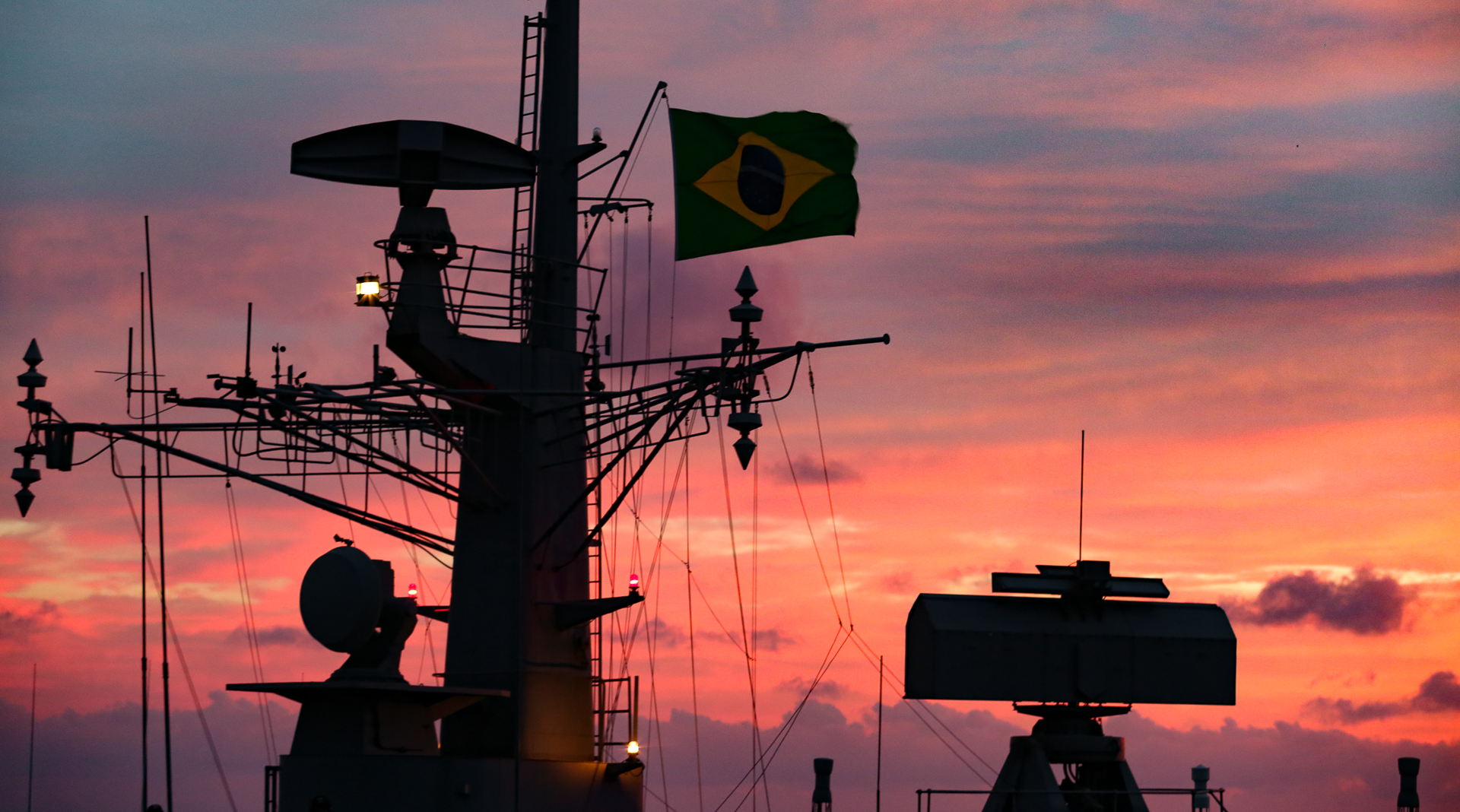 Arquivo liberado pela Marinha do Brasil através de projeto GLAM com Wiki Educação Brasil